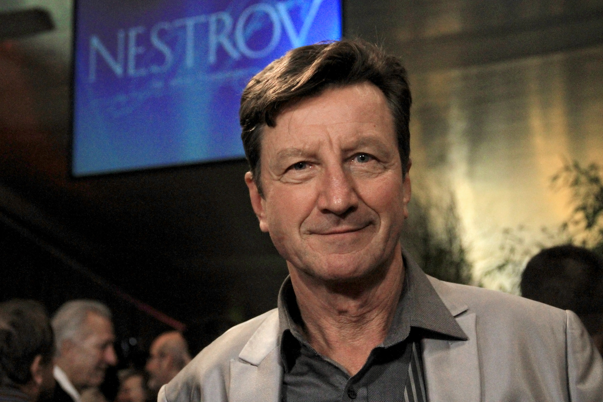 Hubsi Kramar beim Nestroy-Theaterpreis 2012 im MuseumsQuartier in Wien.